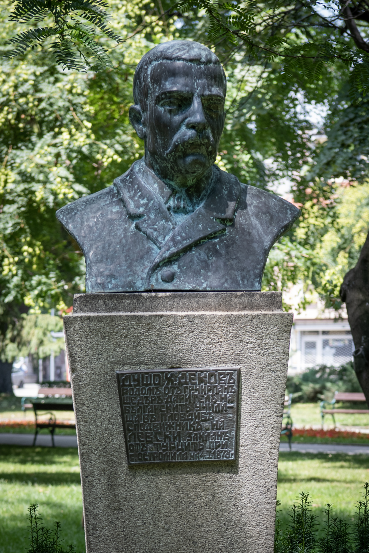 Снимката документира паметника на Душо Хаджидеков в град Пловдив.